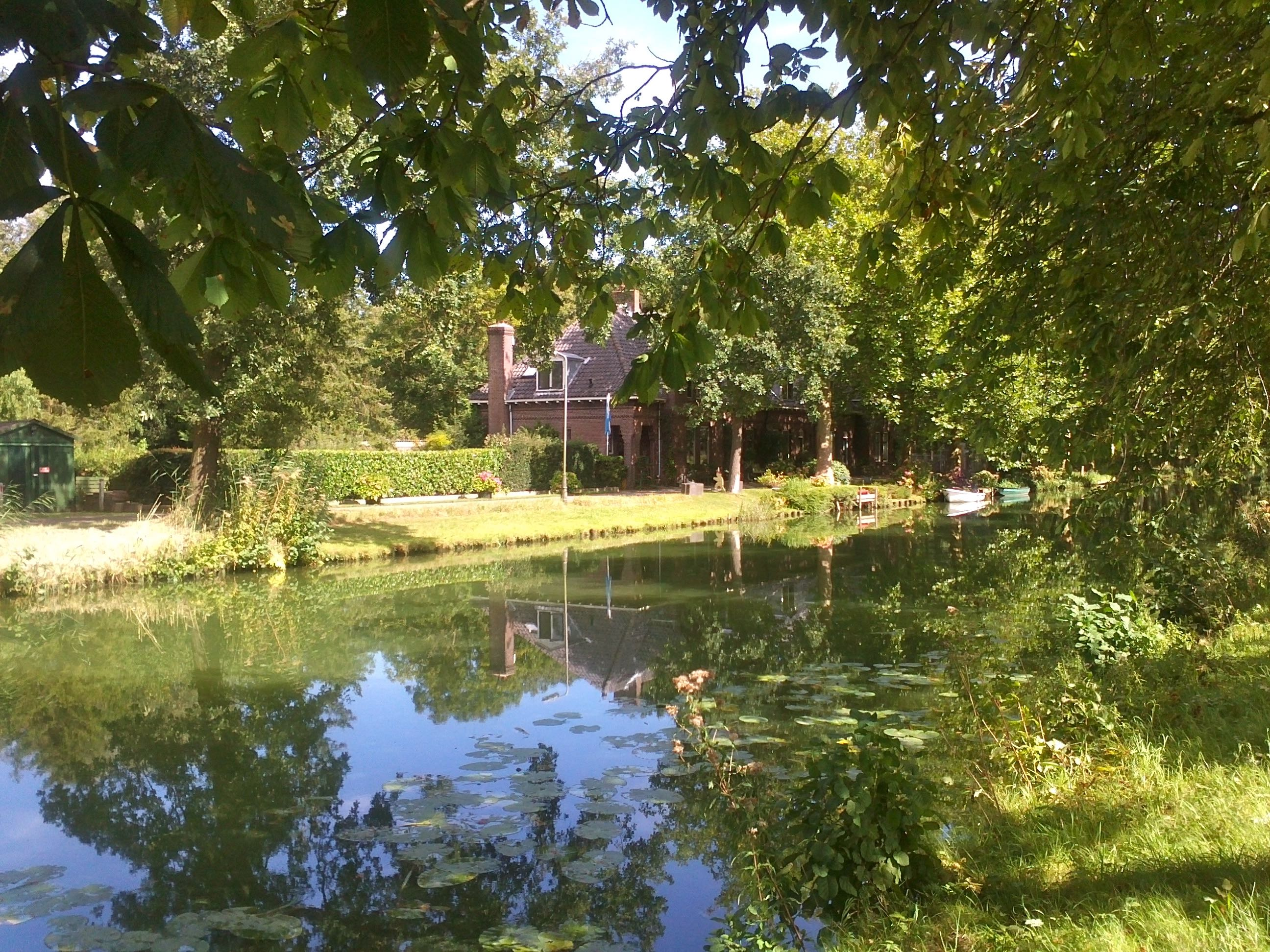 De toegangsweg tot de oude kruitfabriek (1702-2004) langs de Muidertrekvaart